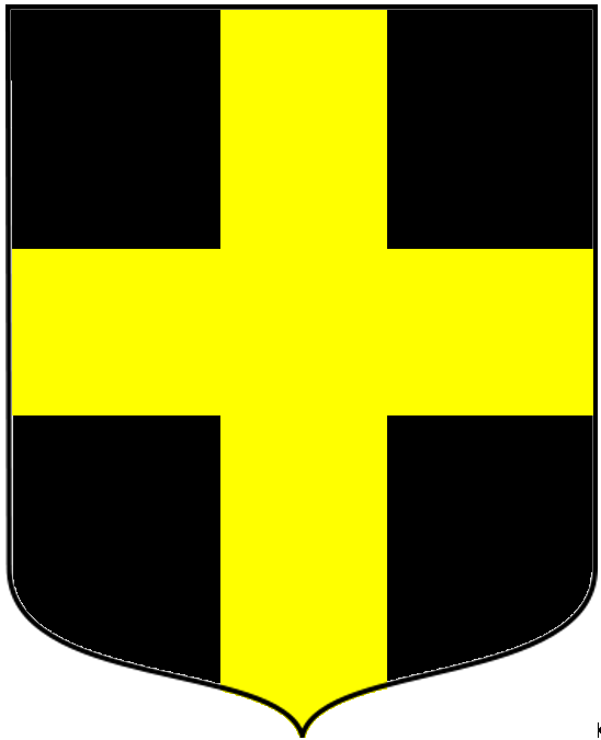 Wappen der Familie d'Antigny de Sainte-Croix "La Croix d'or sur champ de sable"